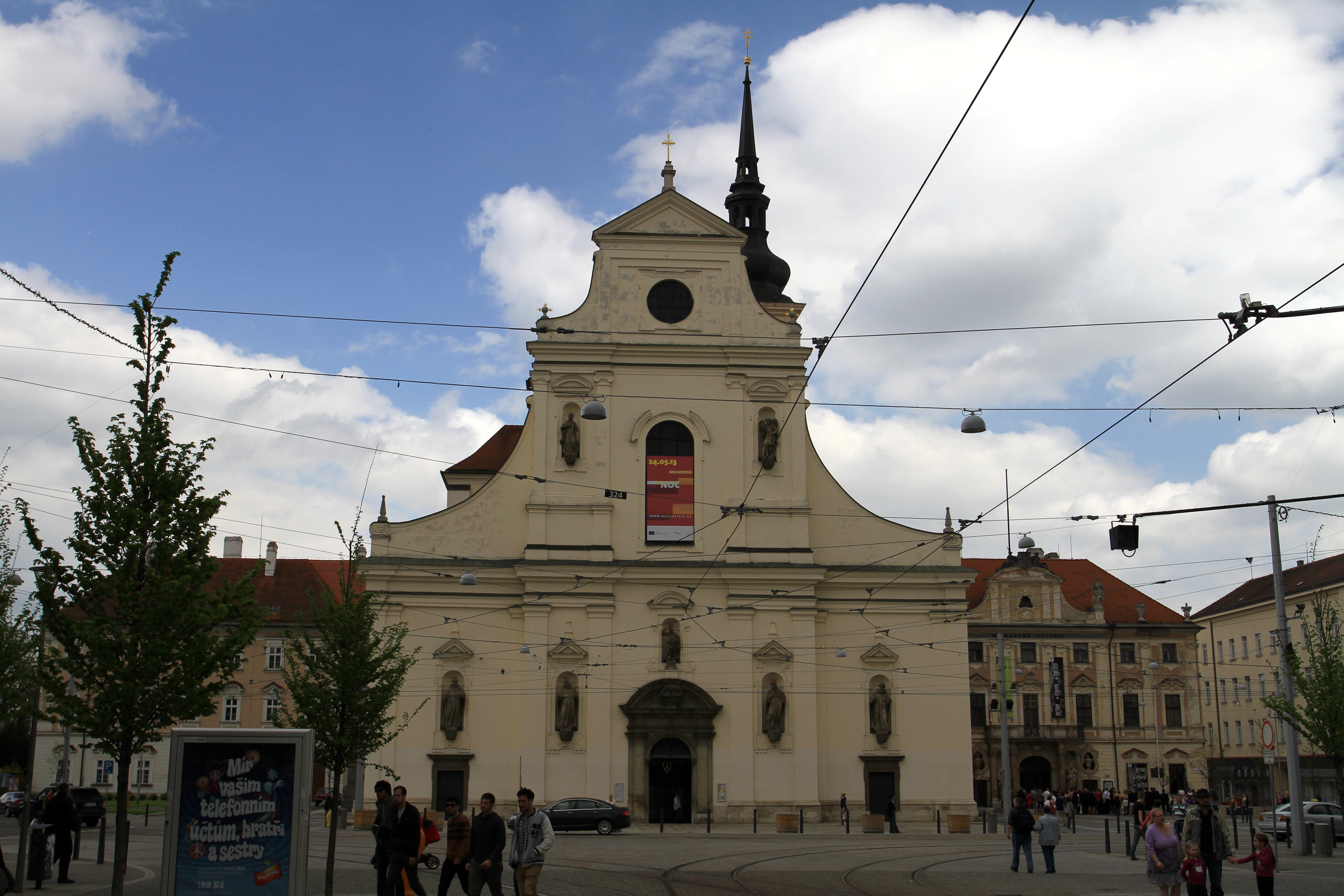 Kostel Zvěstování Panny Marie a svatého Tomáše apoštola, Brno - město, Moravské nám.